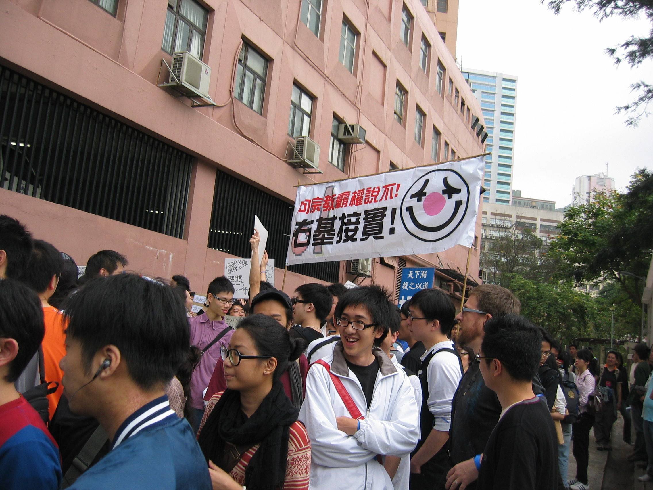 中文（香港）: 遊行人士剛從長沙灣徑出發